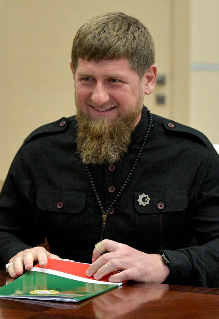 Глава Чеченской Республики Рамзан Кадыров во время рабочей встречи с Президентом России Владимиром Путиным